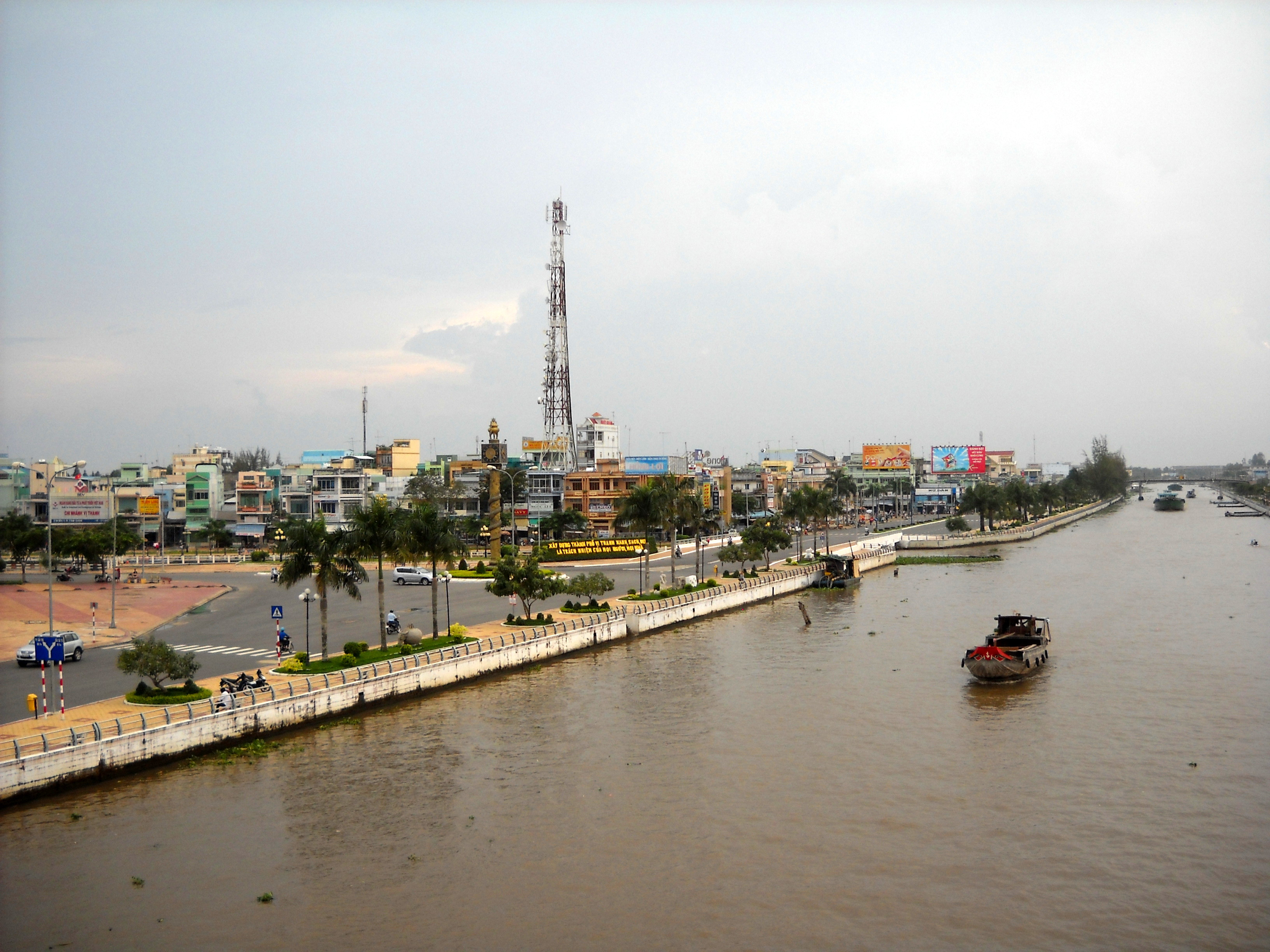 Xáng Xà No Canal in Vị Thanh City, Hậu Giang Province, Việt Nam. The canal connects Hậu River and Hà Tiên Bay.